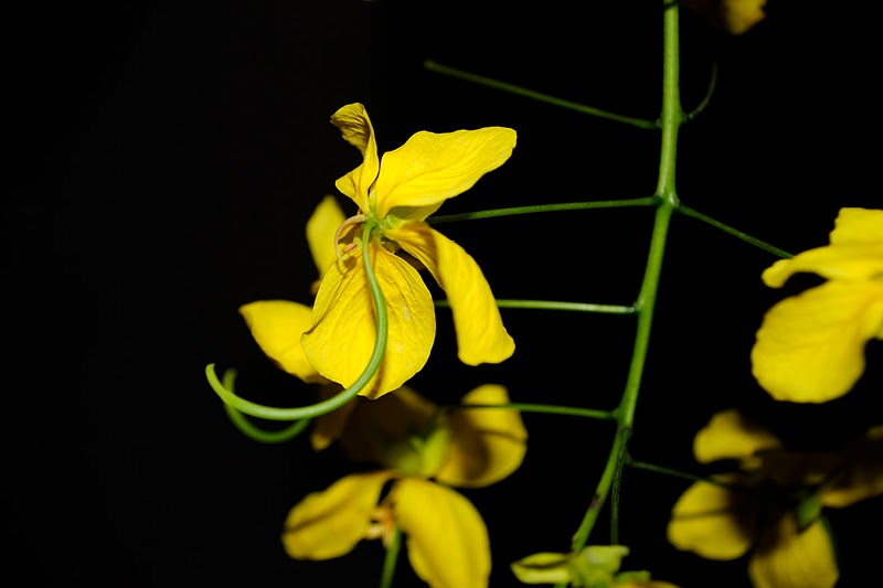 കണിക്കൊന്ന